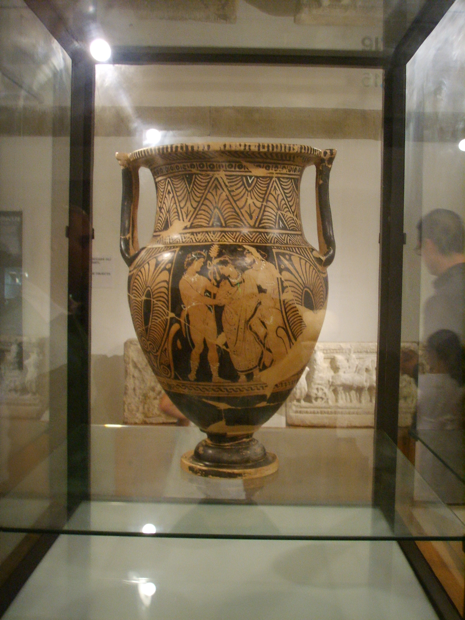 Museo Archeologico di Artimino Province of Prato, Tuscany, italy